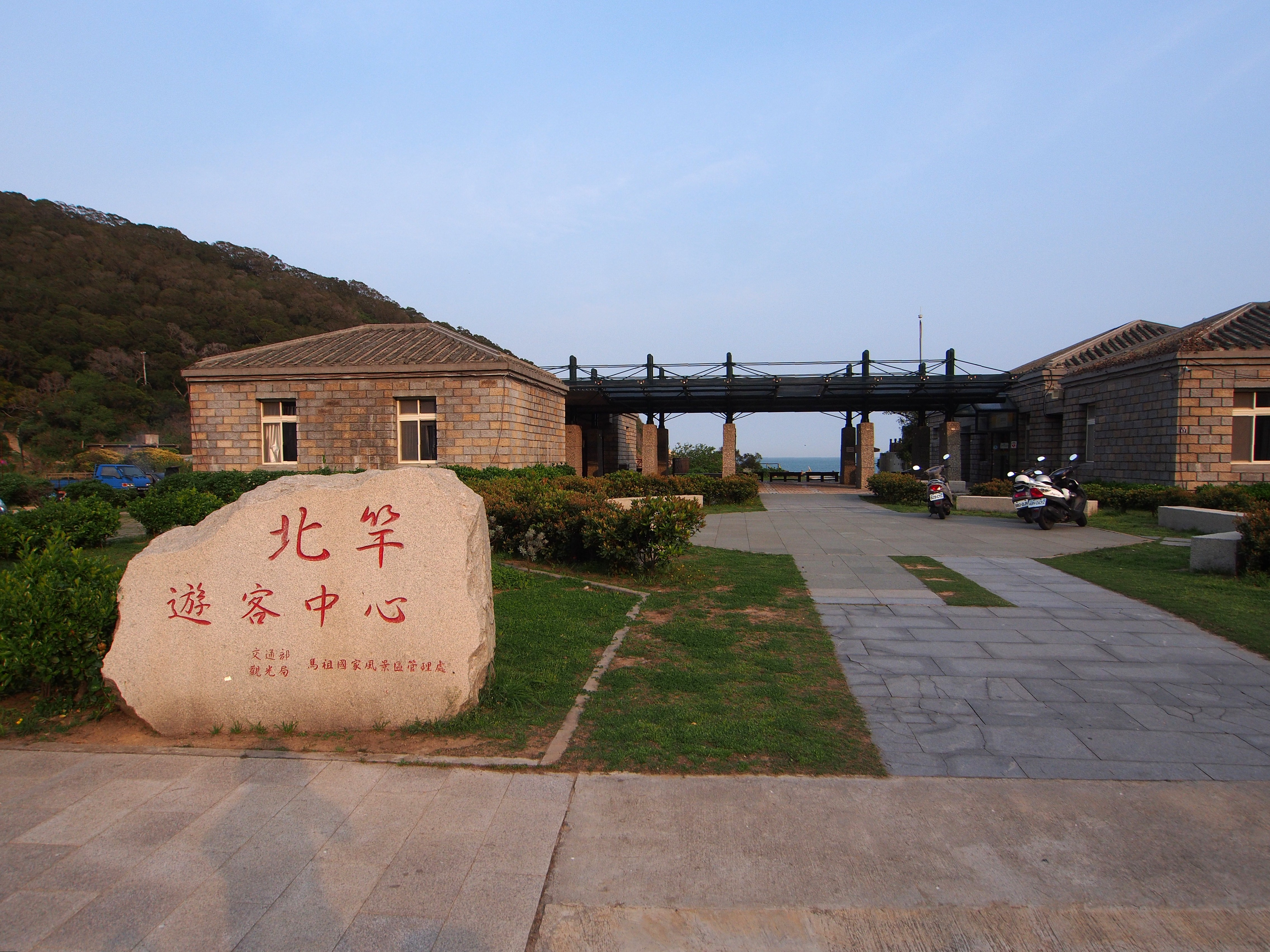 中文（台灣）: 交通部觀光局馬祖國家風景區管理處北竿遊客中心。